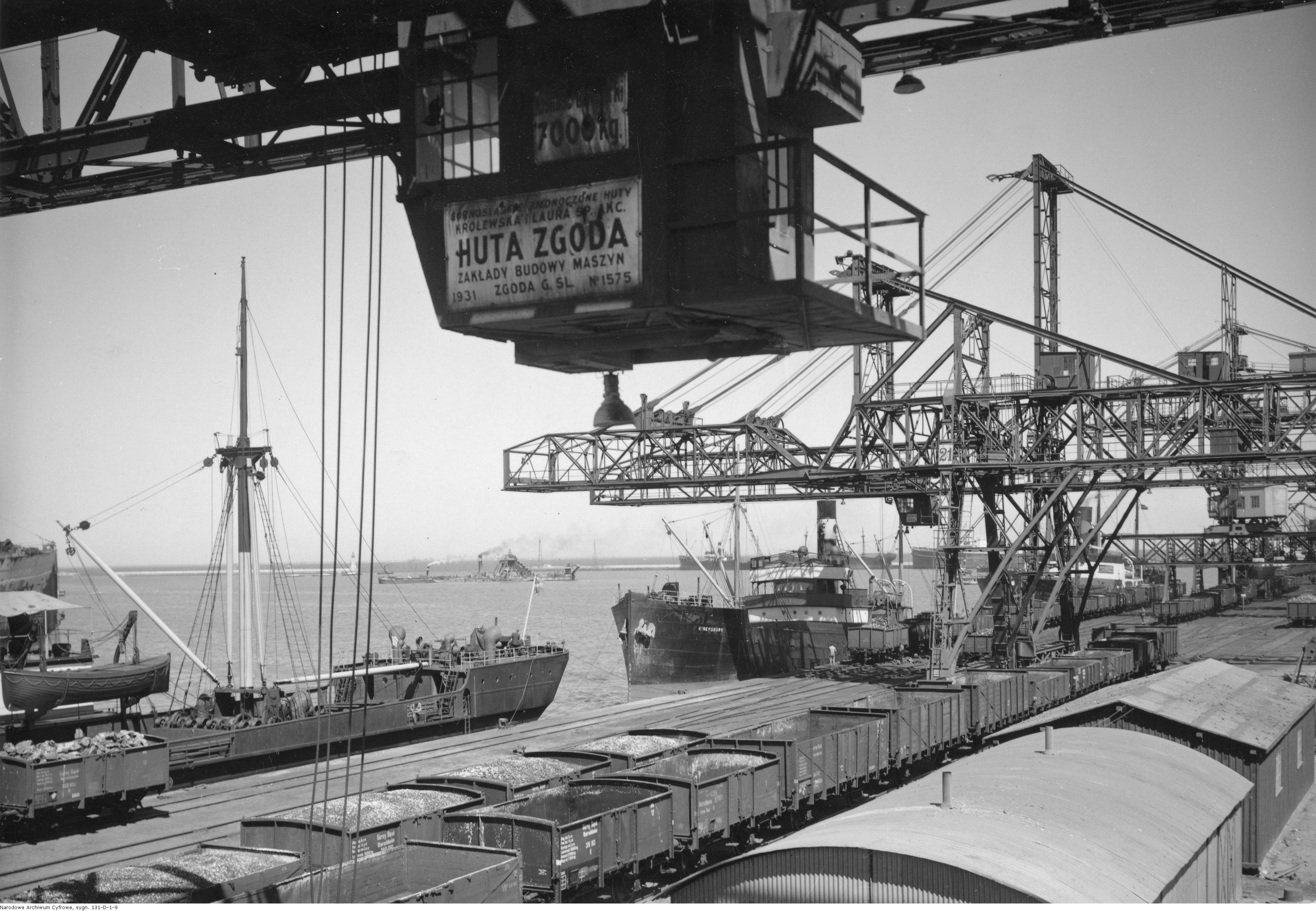 W porcie węglowym.